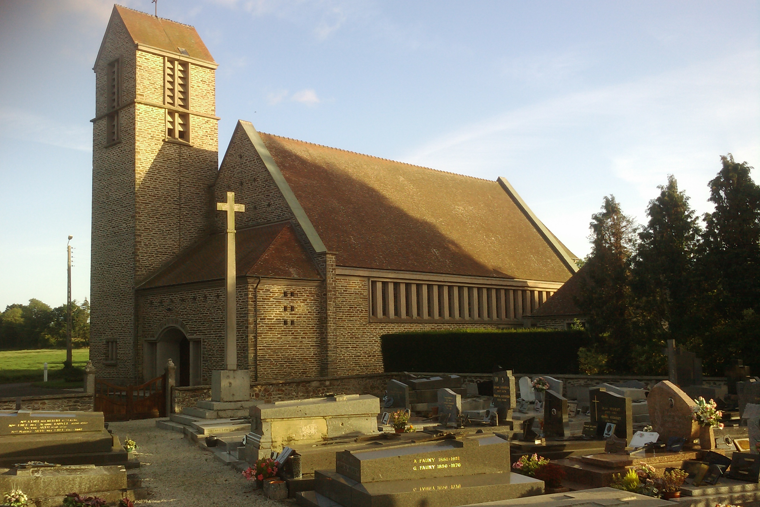 Église Saint Martin de La Meauffe